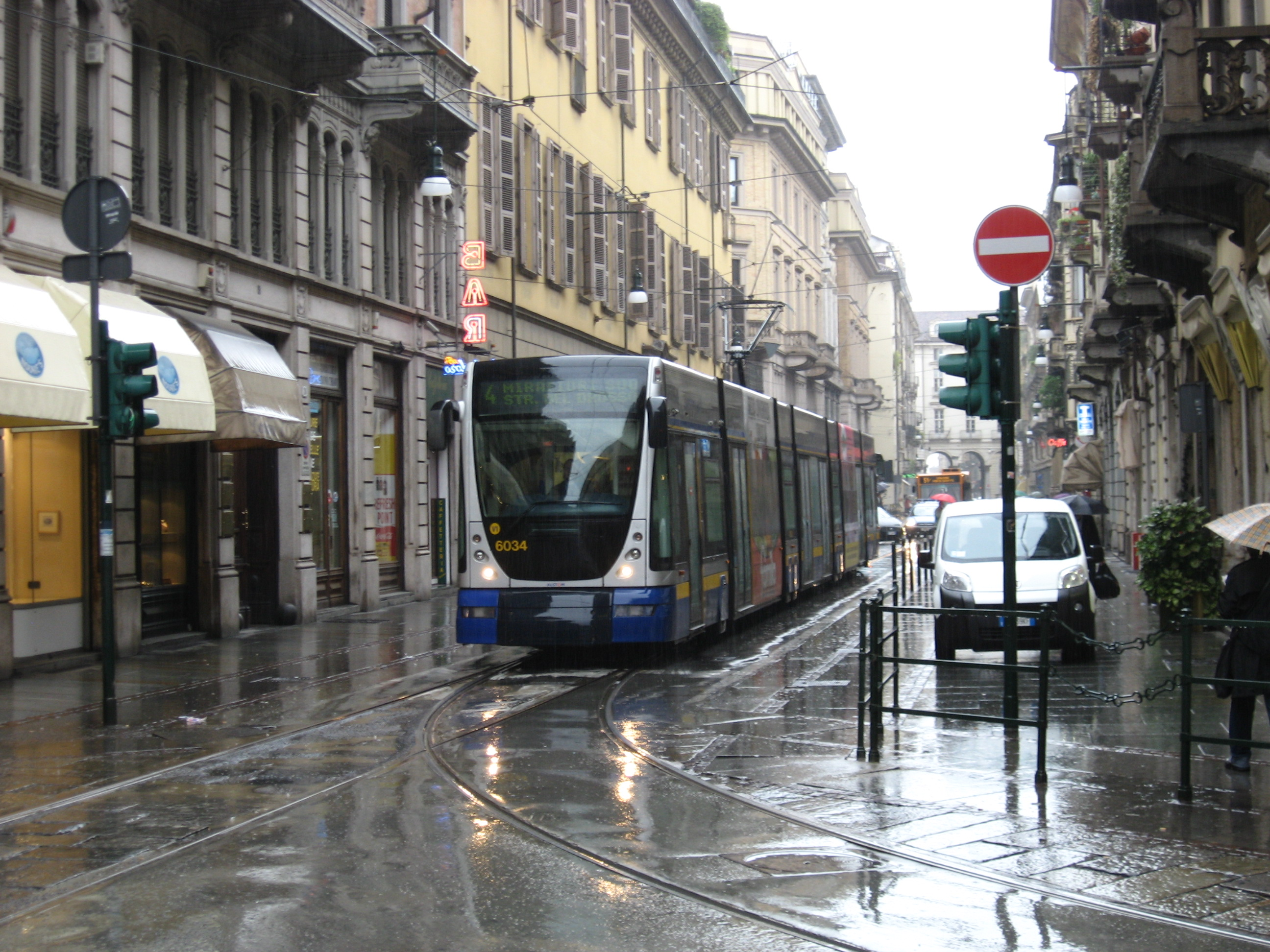 De tram in Turijn in 2009